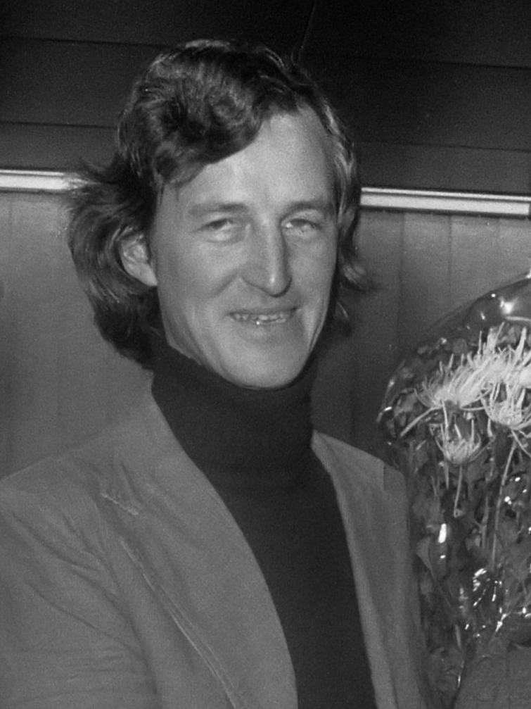 Jules de Corte krijgt Louis Davidsprijs van Louis van Dijk in Amstelveen; Rogier van Otterloo, Ruud Jacobs, Jules de Corte en Louis van Dijk 25 november 1975